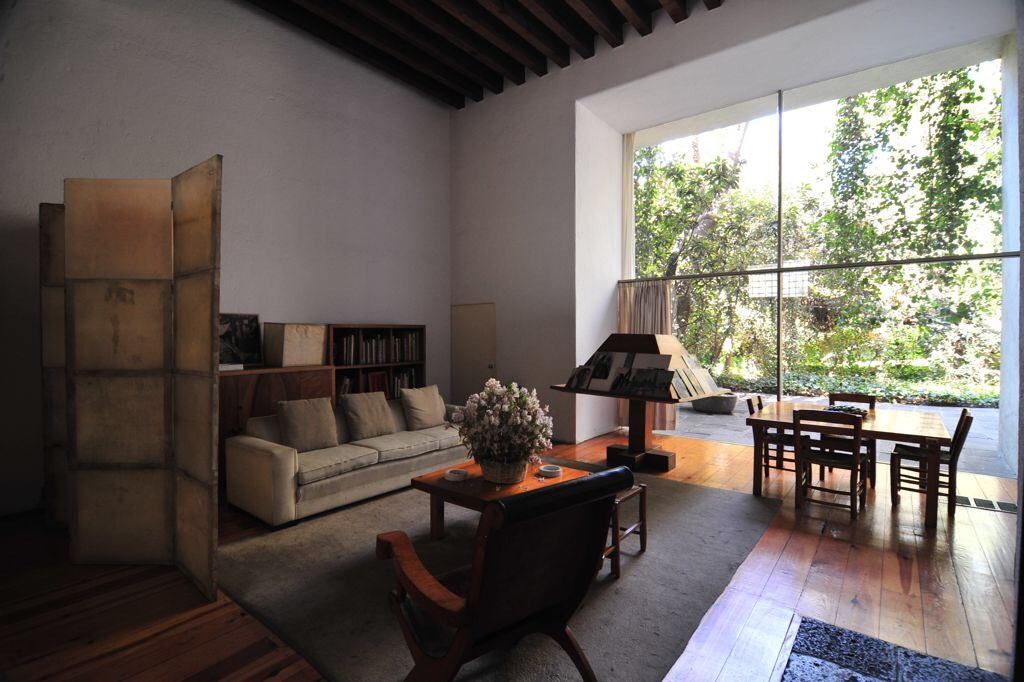 墨西哥建築師易斯巴拉干自宅 Casa Luis Barragan, Tacubaya, Mexico City